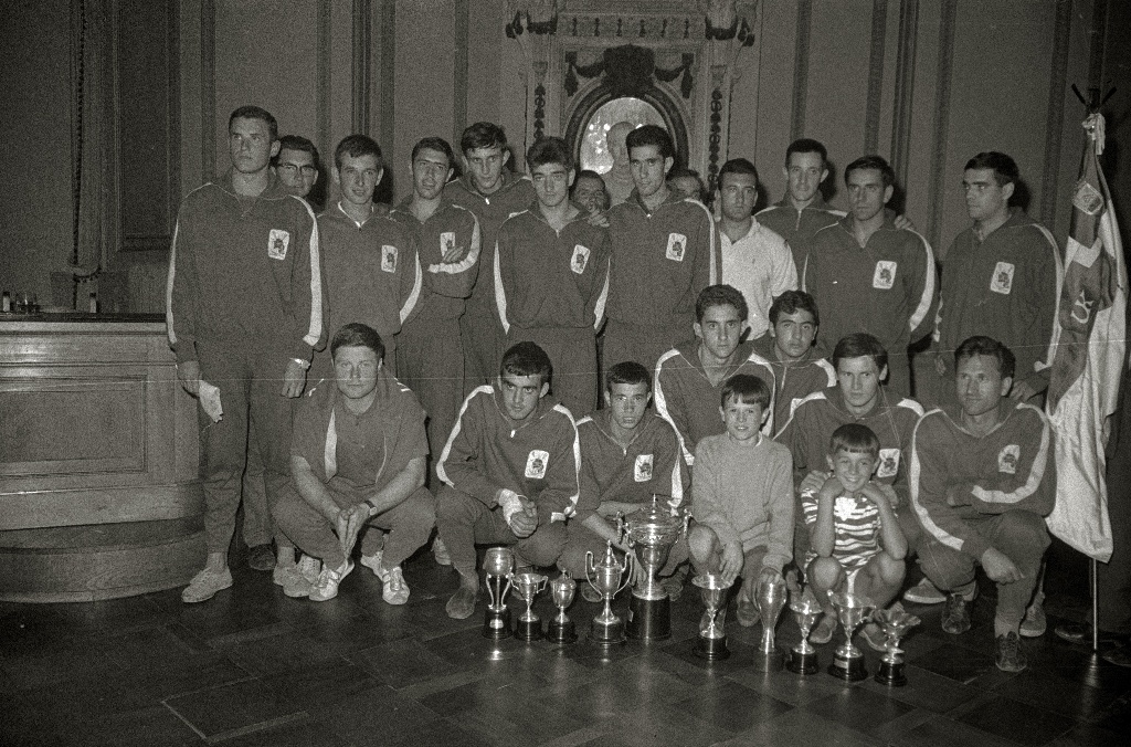 Título original: Ur-Kirolak, campeon de España (1/4) Localización: San Sebastián (Guipúzcoa)